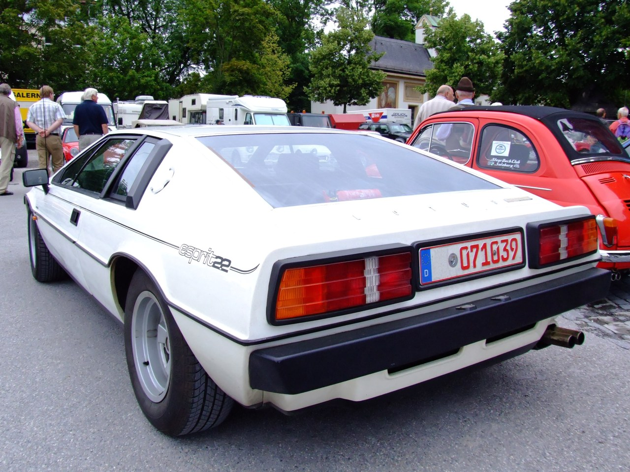 Quelle: selbst fotografiert, 07/2007 Fotograf: Späth Chr.